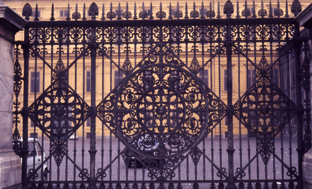 Servizio fotografico : Torino, 1976 / Paolo Monti. - Foglio: 1, Fotogrammi complessivi: 4/20 : Diapositiva, sviluppo cromogeno/ pellicola ; 35 mm. - ((Le diapositive nn. 01-05 e 10-20 costituiscono un'altra serie. - Occasione: Mostra "Pelagio Palagi artista e collezionista", Museo civico di Bologna e Torino. - (1950-1978), presso Archivio Paolo Monti. - Fonte: Fattura di Paolo Monti: IV. Commesse/ Fattura n. 02/ Museo Civico - Fotografie per mostra Pelagio Palagi (1976/03/03), presso Archivio Paolo Monti. - Fonte: Monografia: Pelagio Pelagi, artista e collezionista, catalogo della mostra, Bologna 1976, Bologna, Grafis Edizioni (1976). - Fonte: Agenda di Paolo Monti: Diapositive 24x36mm (1948-1982), presso Archivio Paolo Monti. - Fonte: Agenda di Paolo Monti: Leica 1501-3000 Controllo numerazione